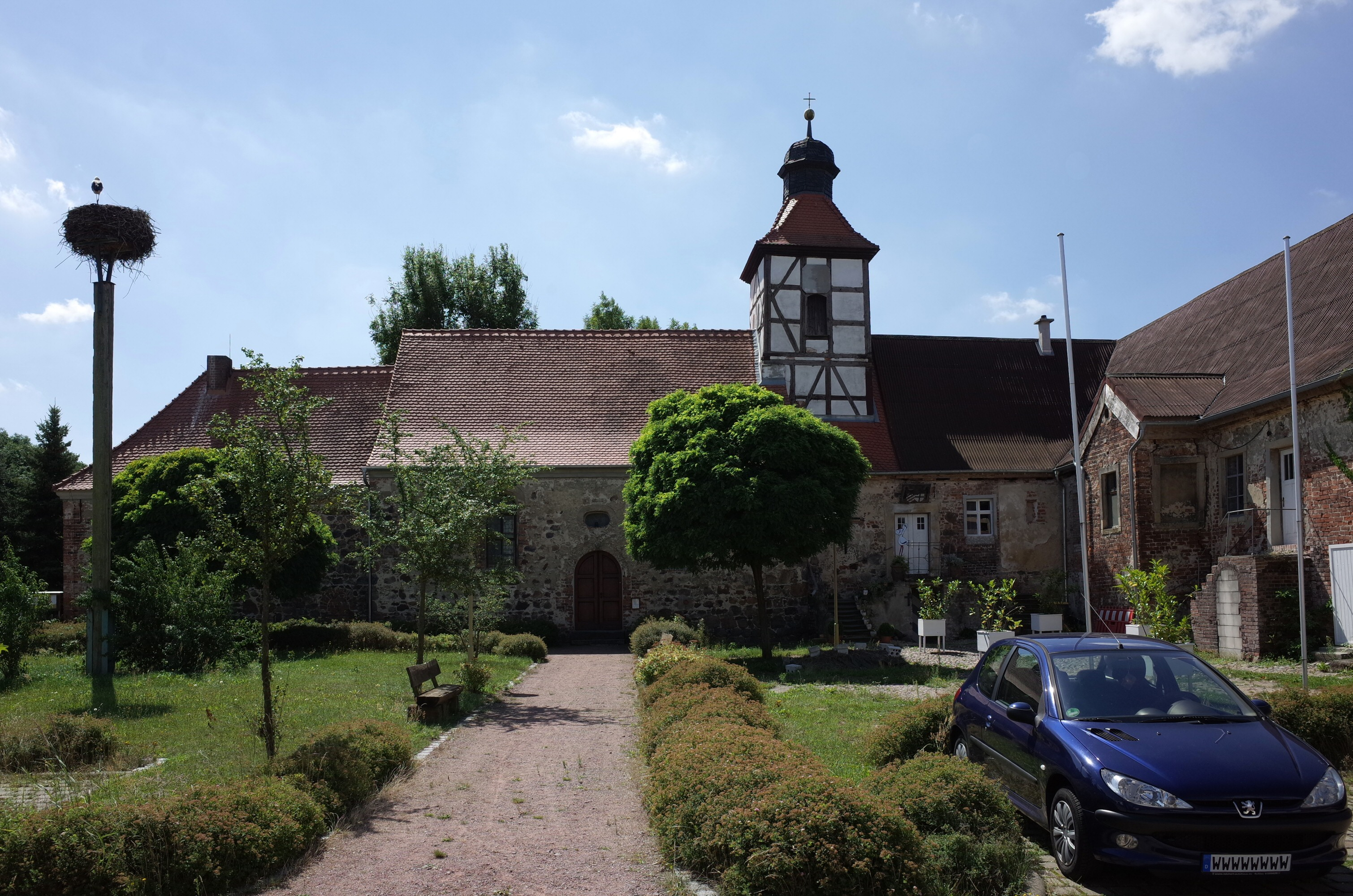 Coswig (Anhalt), Ortsteil Buro. Komturkirche zu Buro